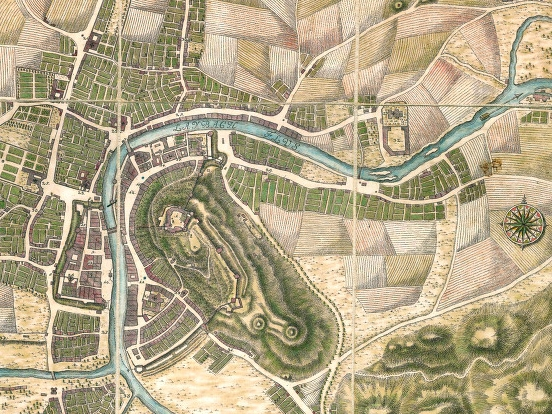 Fragment of the Plan und Prospect von der Haupt Stadt Laybach